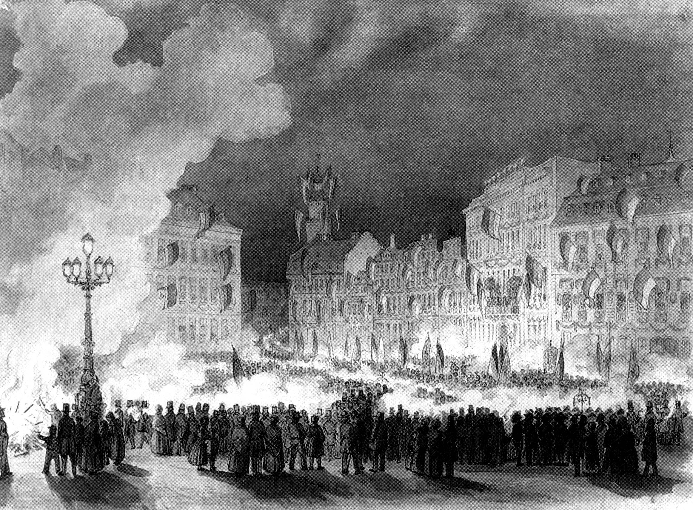 Lavierte Tuschezeichnung, um 1848. Fackelzug auf dem Roßmarkt zum Empfang des Vorparlaments